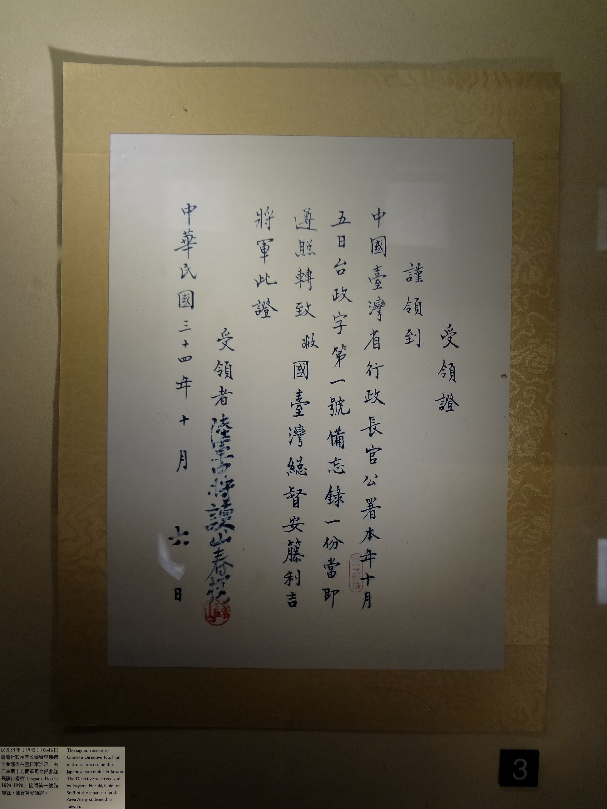 國立中正紀念堂展示品：1945年（中華民國34年）10月6日，大日本帝國陸軍中將諫山春樹簽署臺灣省行政長官公署台政字第一號備忘錄受領證。